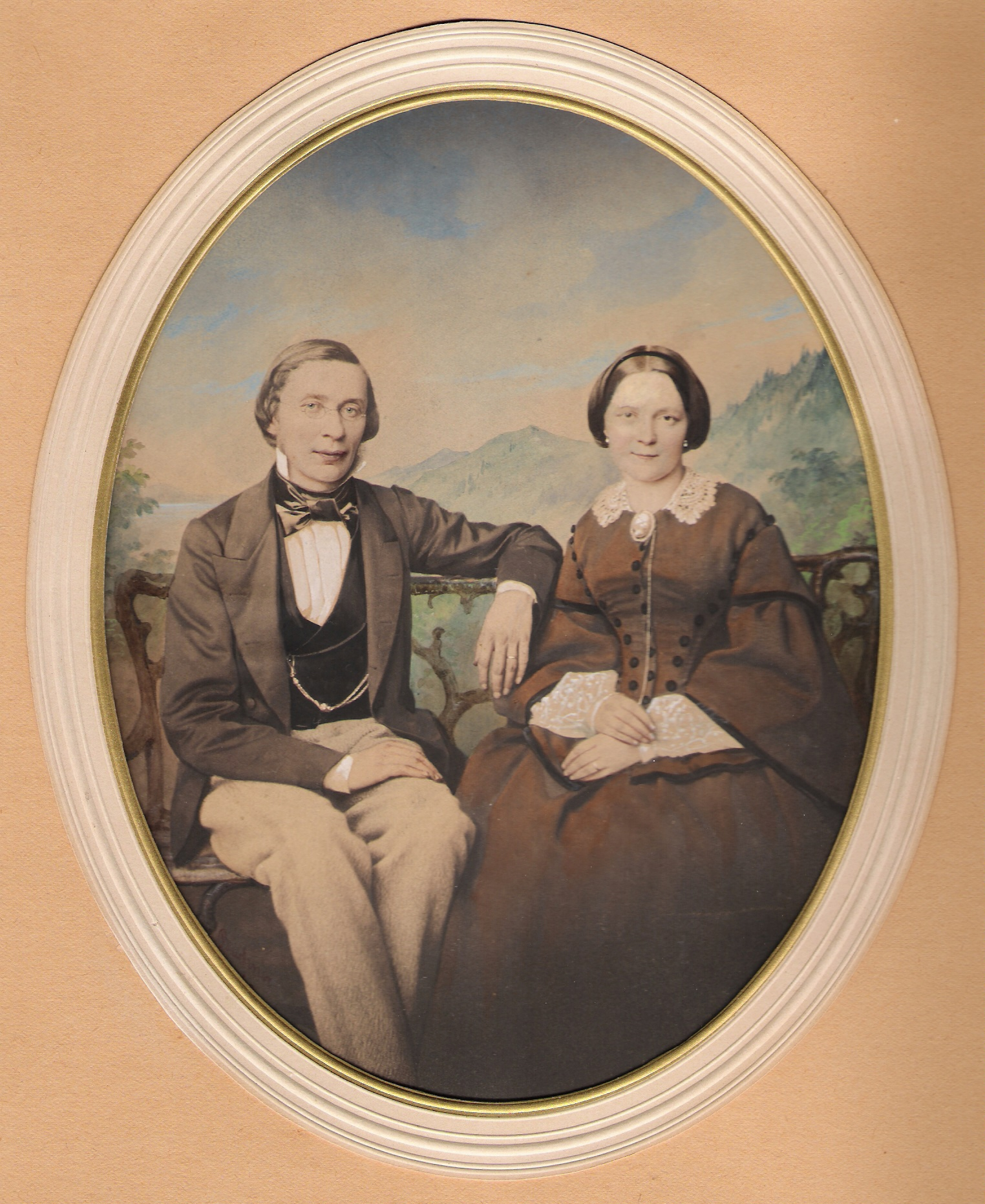 Der Kaufmann Otto Feuerlein (* 16. April 1822 in Stuttgart; † 11. Juni 1875 in Zürich) und seine Frau Mathilde Feuerlein geb. Ströbel (* 1824; † 1866)